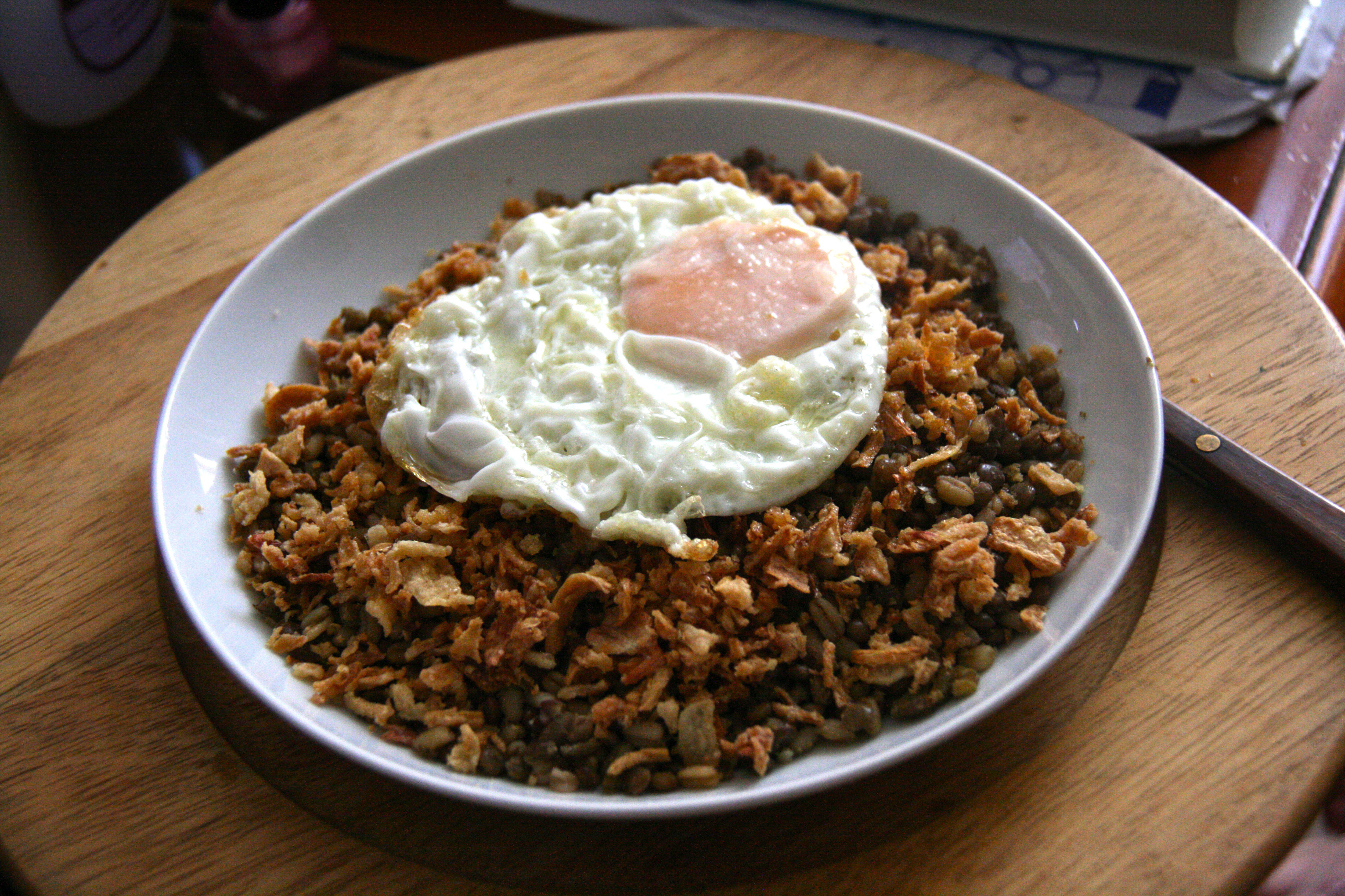 Mujaddara mit Spiegelei, nach Art von Tamorlan.